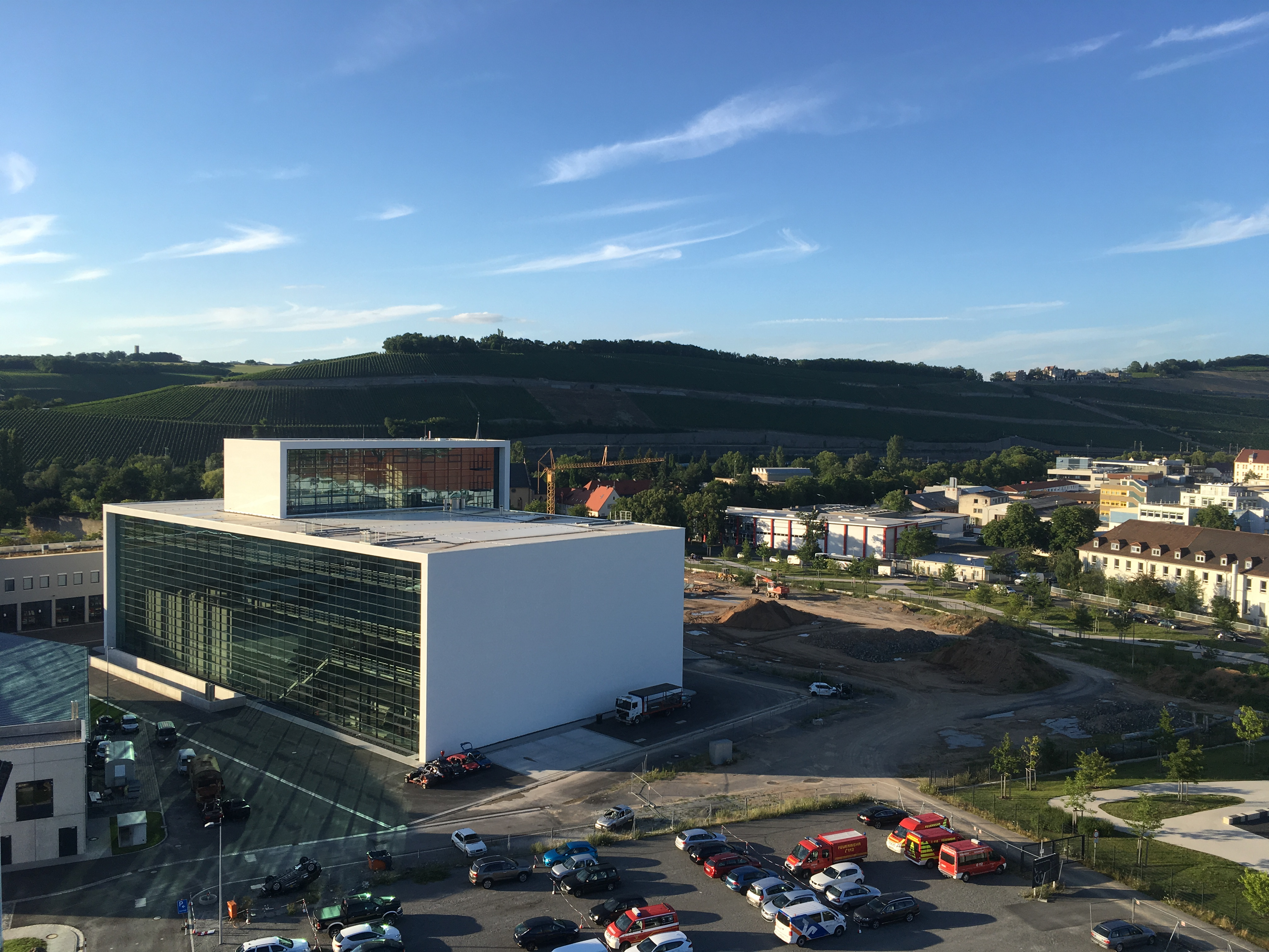 Zeigt die Übungshalle der SFS Würzburg von der Weißenburgstraße aus gesehen.